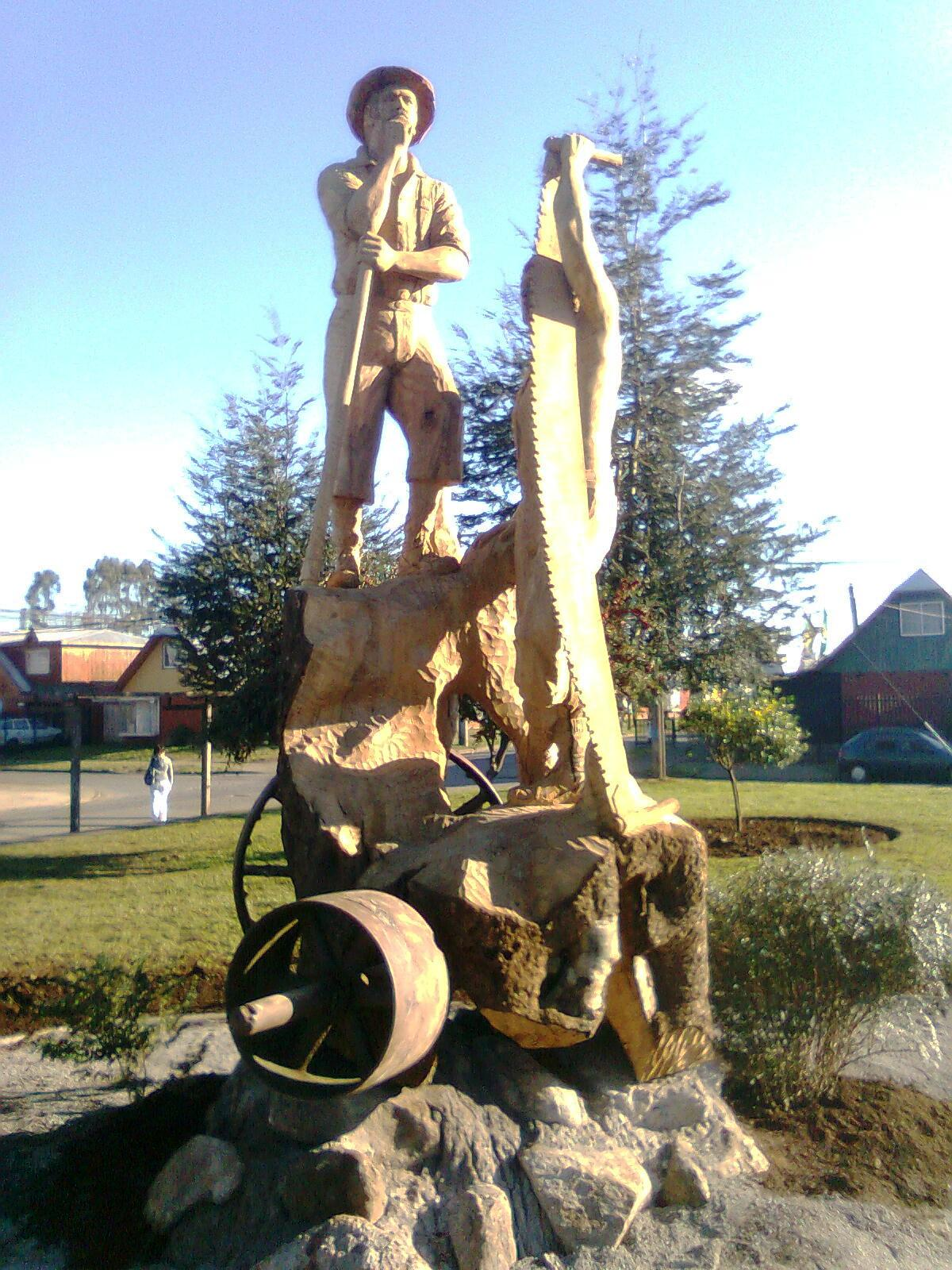 Escultura en la ciudad de Labranza, Chile, hecha de un viejo árbol caído de forma natural, que fue reciclado en el mismo lugar en que dio en tierra.